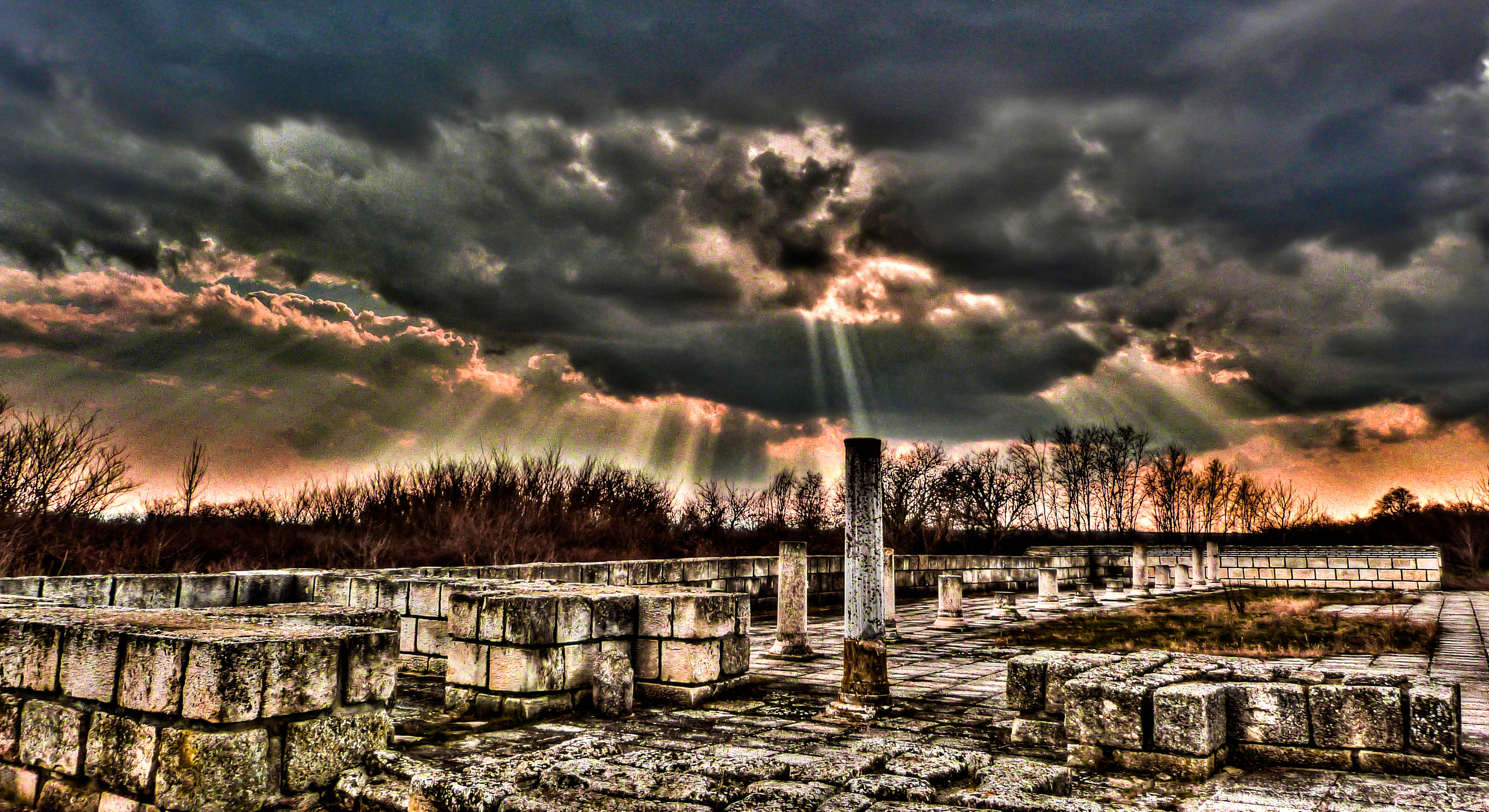 Дворцова църква Плиска